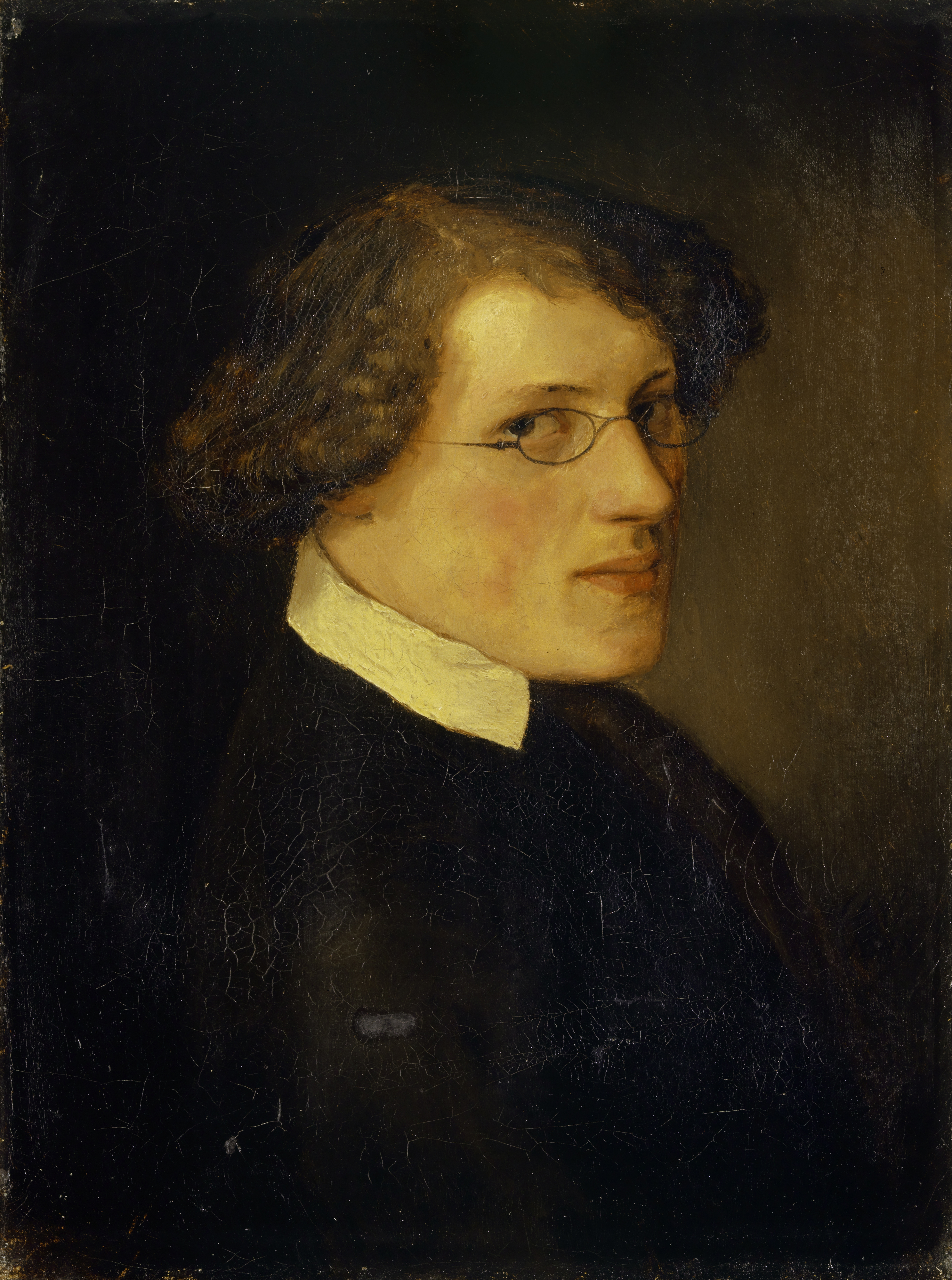 Arnold Böcklin: Bildnis Jakob Mähly als Student, 1848. HxB: 32.6 x 24.4 cm; Öl auf Leinwand. Kunstmuseum Basel, Inv. 93